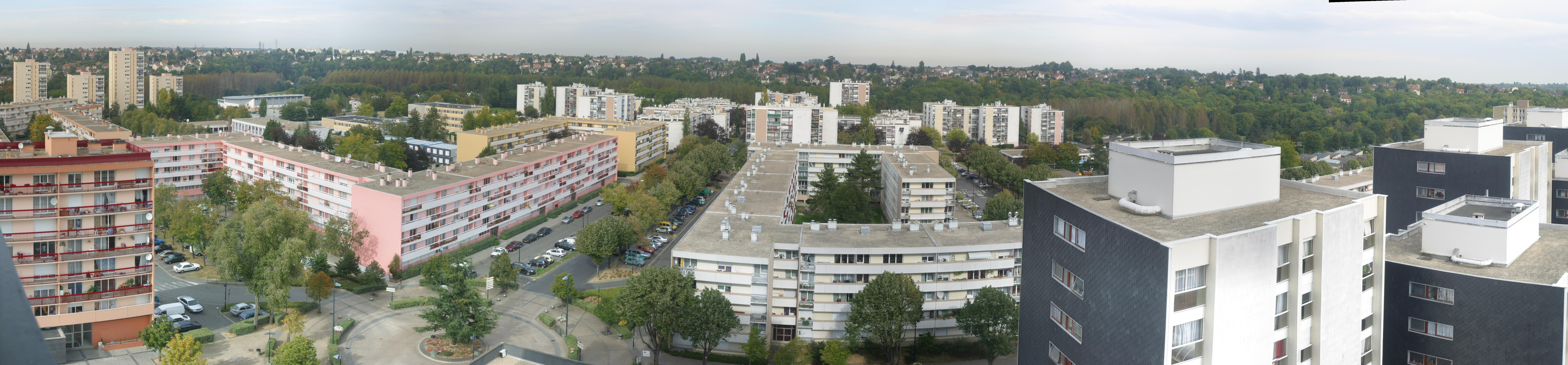 Vue panoramique du quartier des Cinéastes Epinay sous Senart